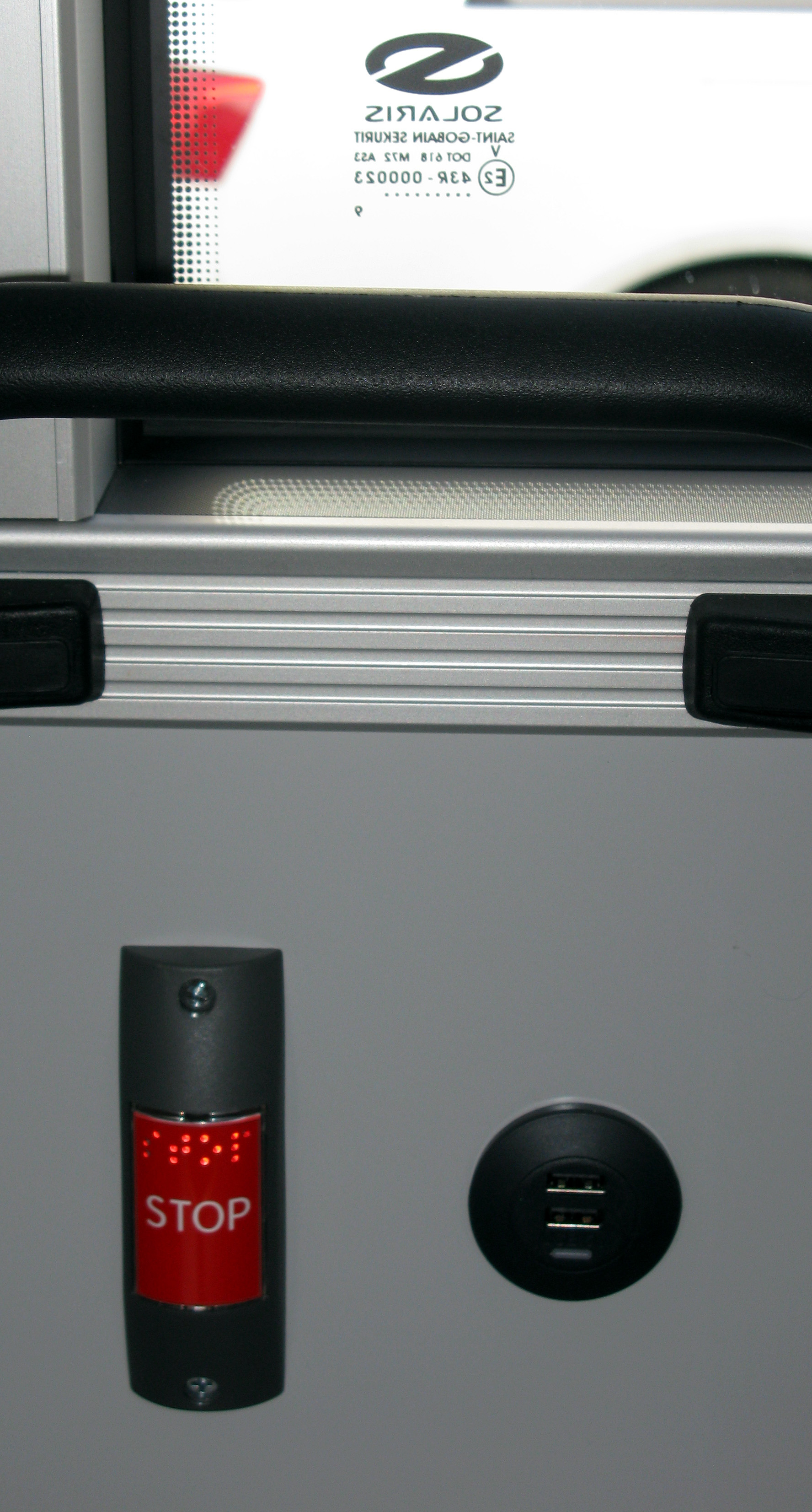 Solaris Urbino 12 electric von der Freiburger Verkehrs AG auf der Linie 27, USB-Steckdosen am 4er-Sitz